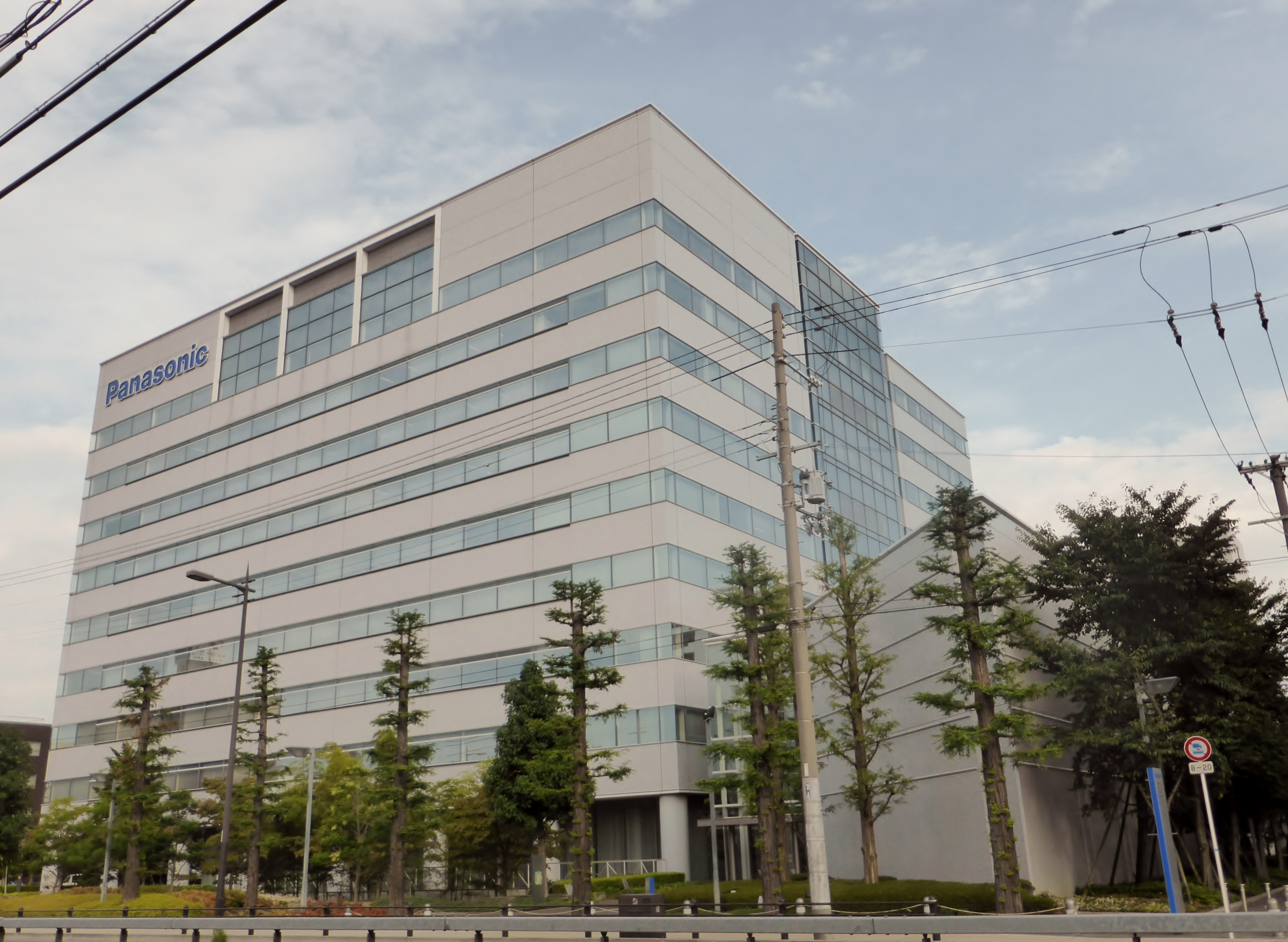 三洋電機株式会社本社を撮影。